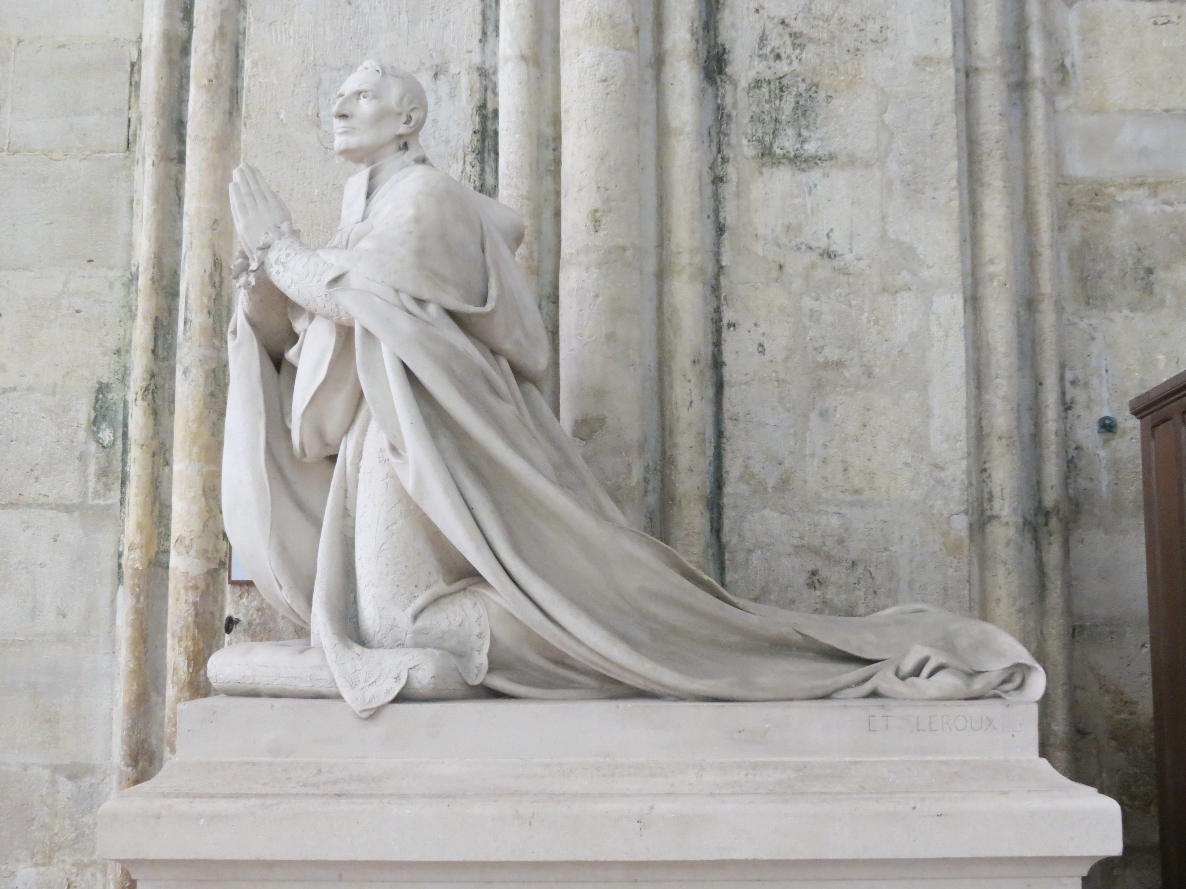 Détail de l'orant de Charles-Frédéric Rousselet.